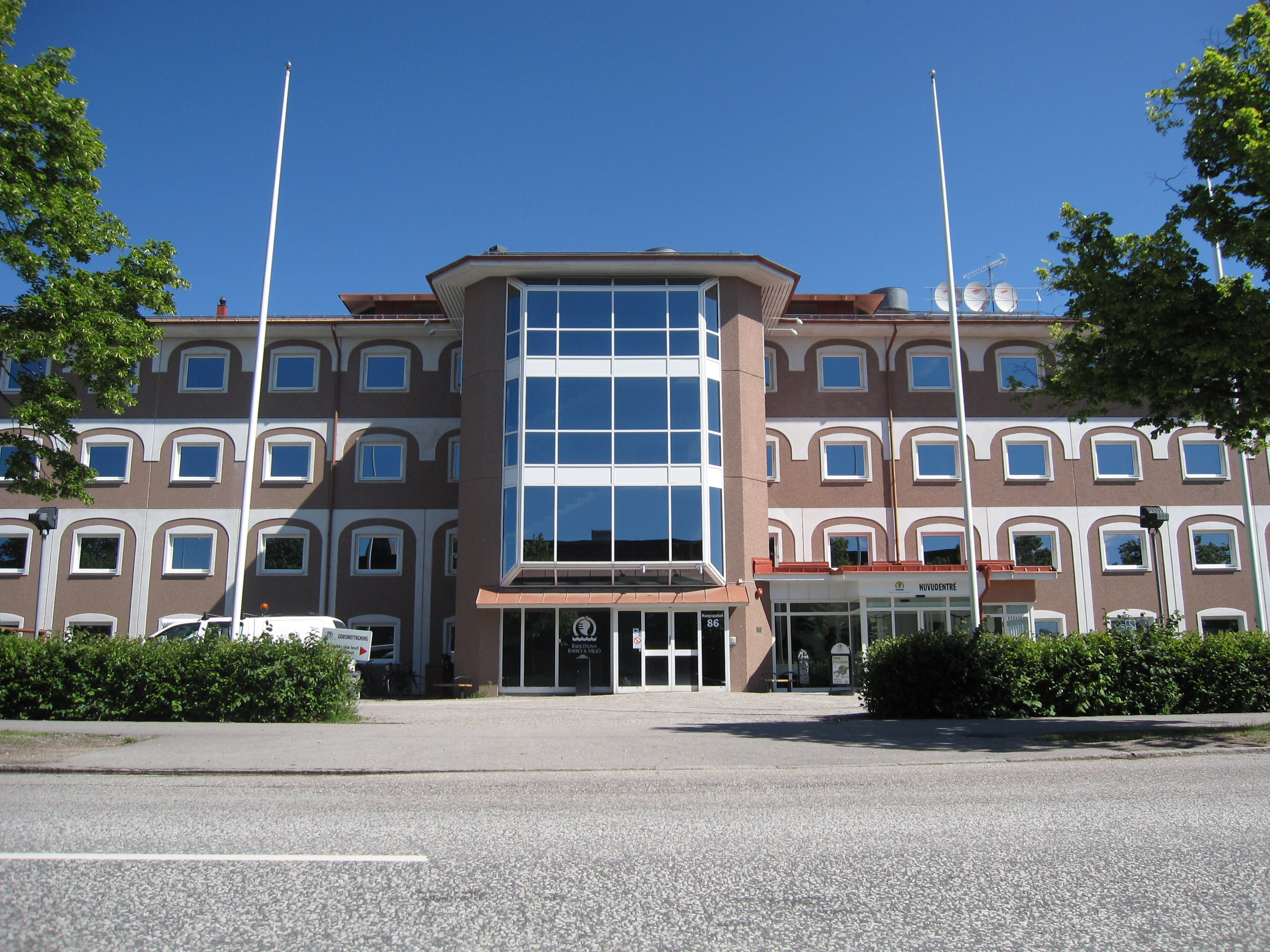 Eskilstuna energi och miljös huvudkontor på Kungsgatan i Eskilstuna